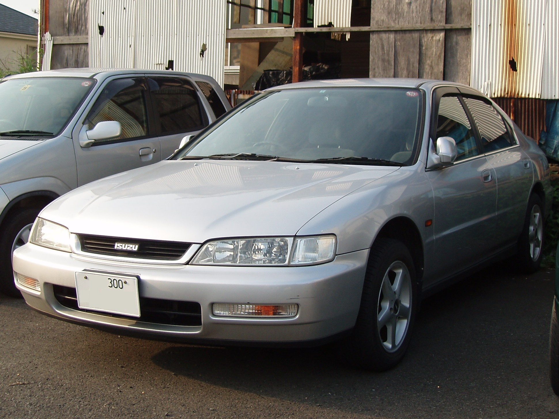 ISUZU ASKA -generation 3